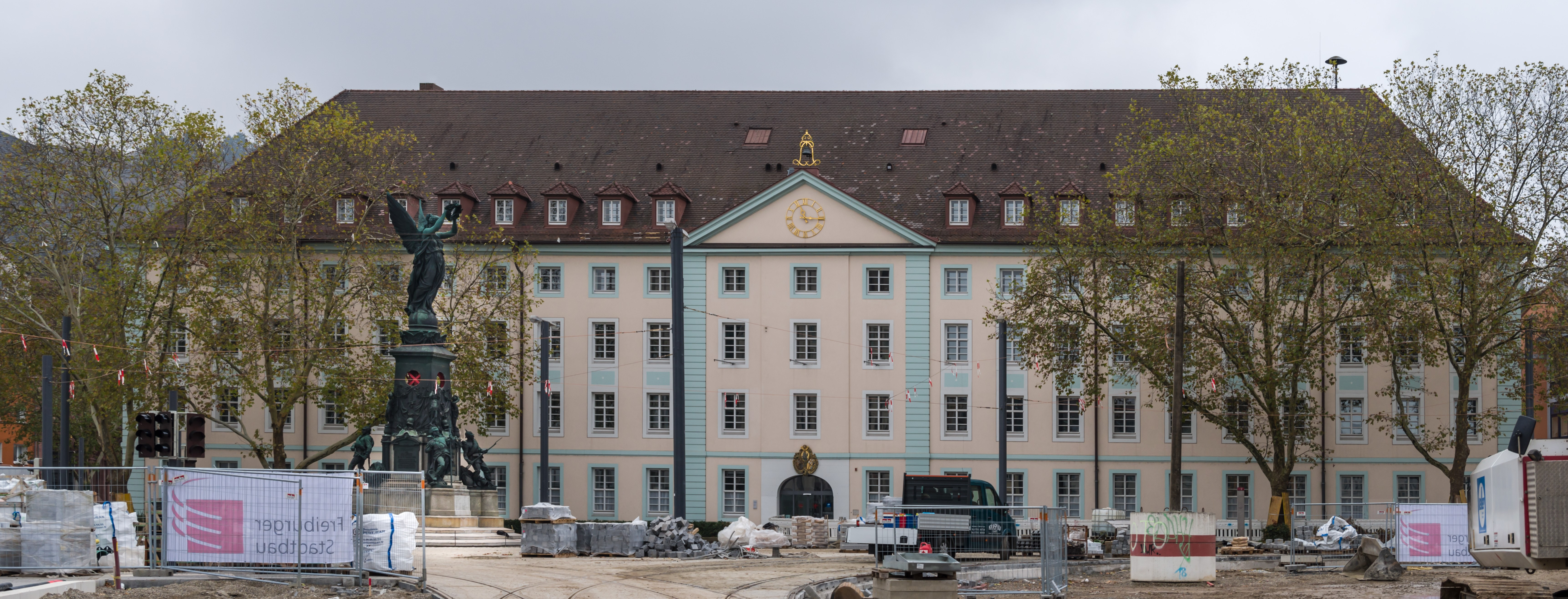 Das Siegesdenkmal nach dem Neuaufbau, die Plaketten fehlen noch